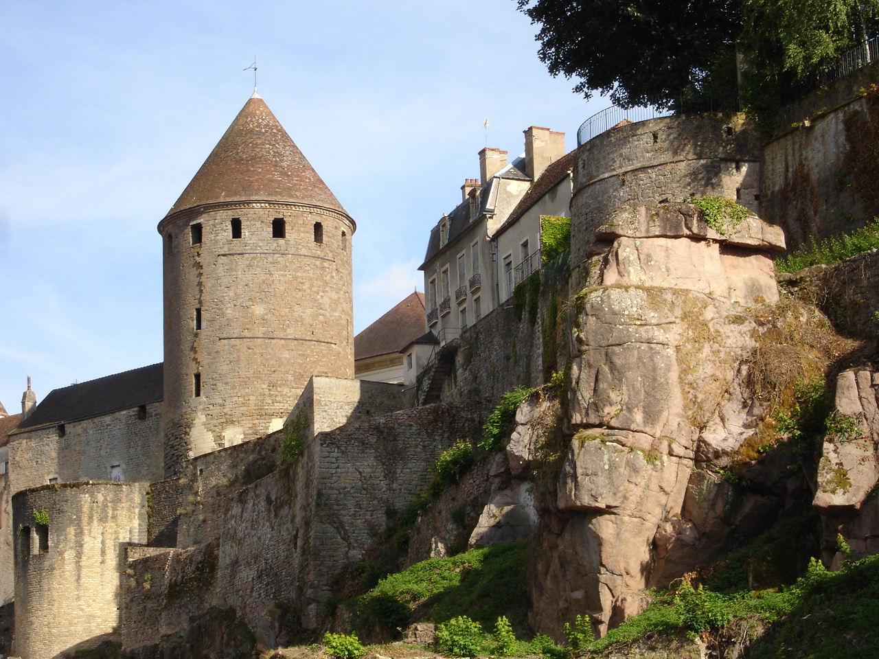 Tour de la Géhenne à Semur-en-Auxois prise du bas des remparts en août 2006